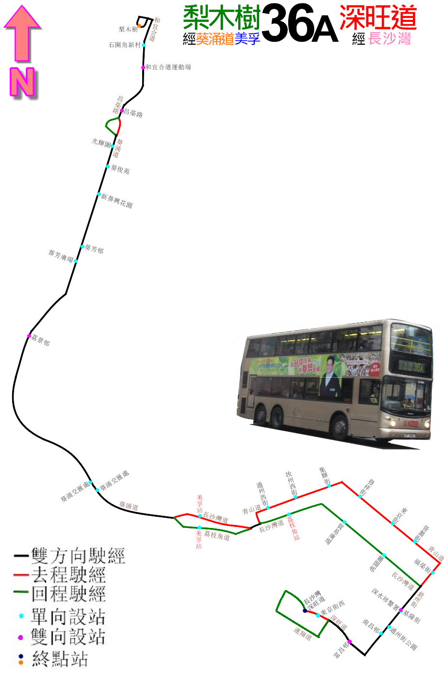 中文（香港）: 九巴36A線的走線圖